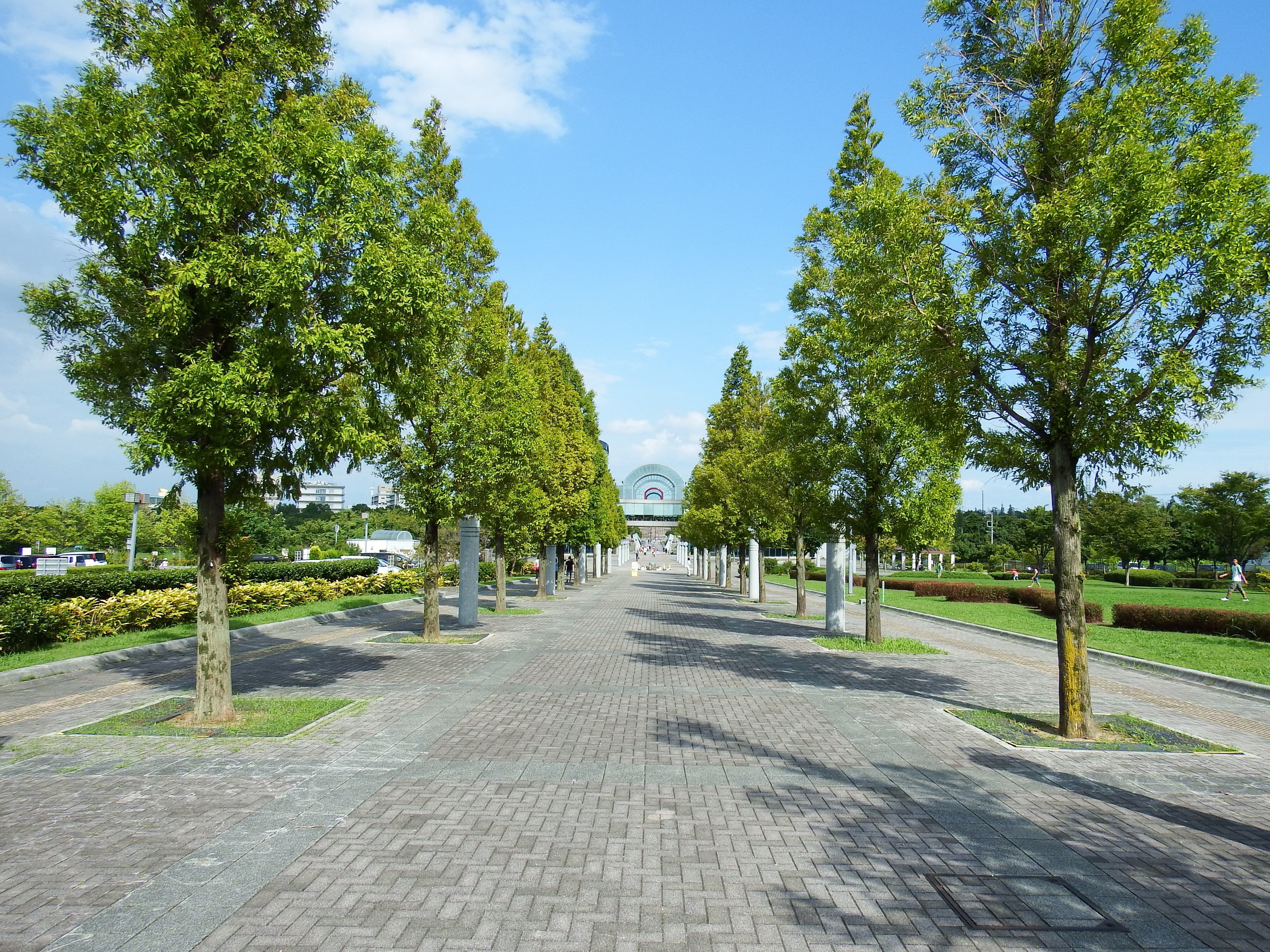 あいち健康の森１